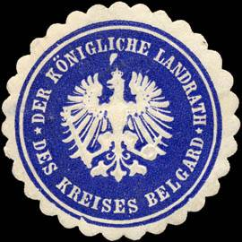 Sealing stamp Title: Der Königliche Landrath des Kreises Belgard Description: lila, weiß, geprägt Place: Belgard size: 4 cm